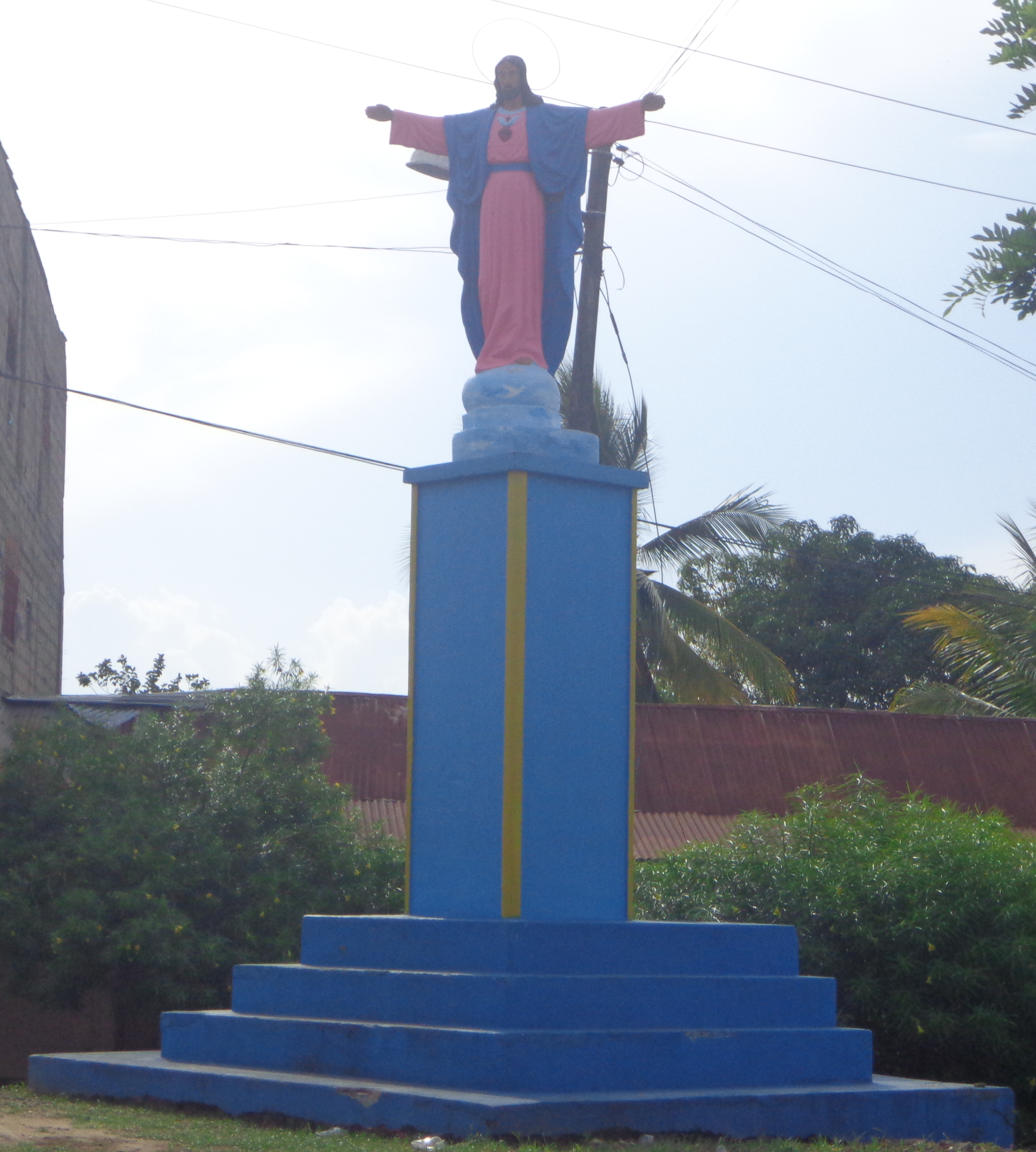 Ubicación: PLANETA RICA, CÓRDOBA